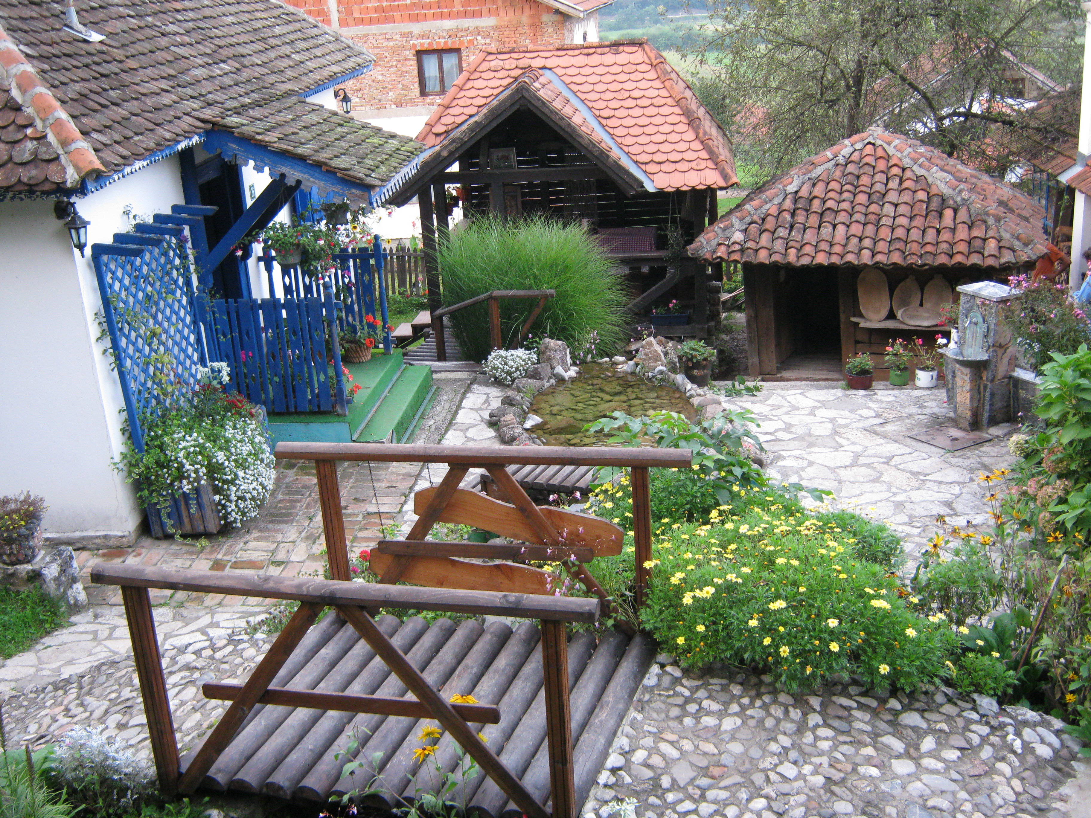 Етно парк Терзића авлија, као сеоско туристичко домаћинство, из околине Ужица, у селу Злакуса (185 km од Београда) представља једну врсту музеја на отвореном и затвореном. У близини се налази Потпећка пећина тако да је савршено место за излет и увид у прелепу историју села, културе и природних лепота Србије.